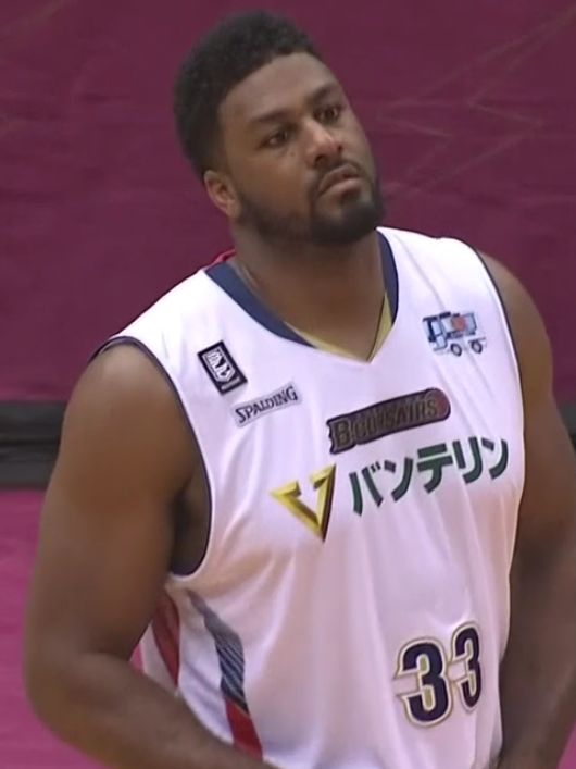 2018年12月8日撮影 2018-19 B1 第12節 川崎-横浜 川崎市とどろきアリーナ